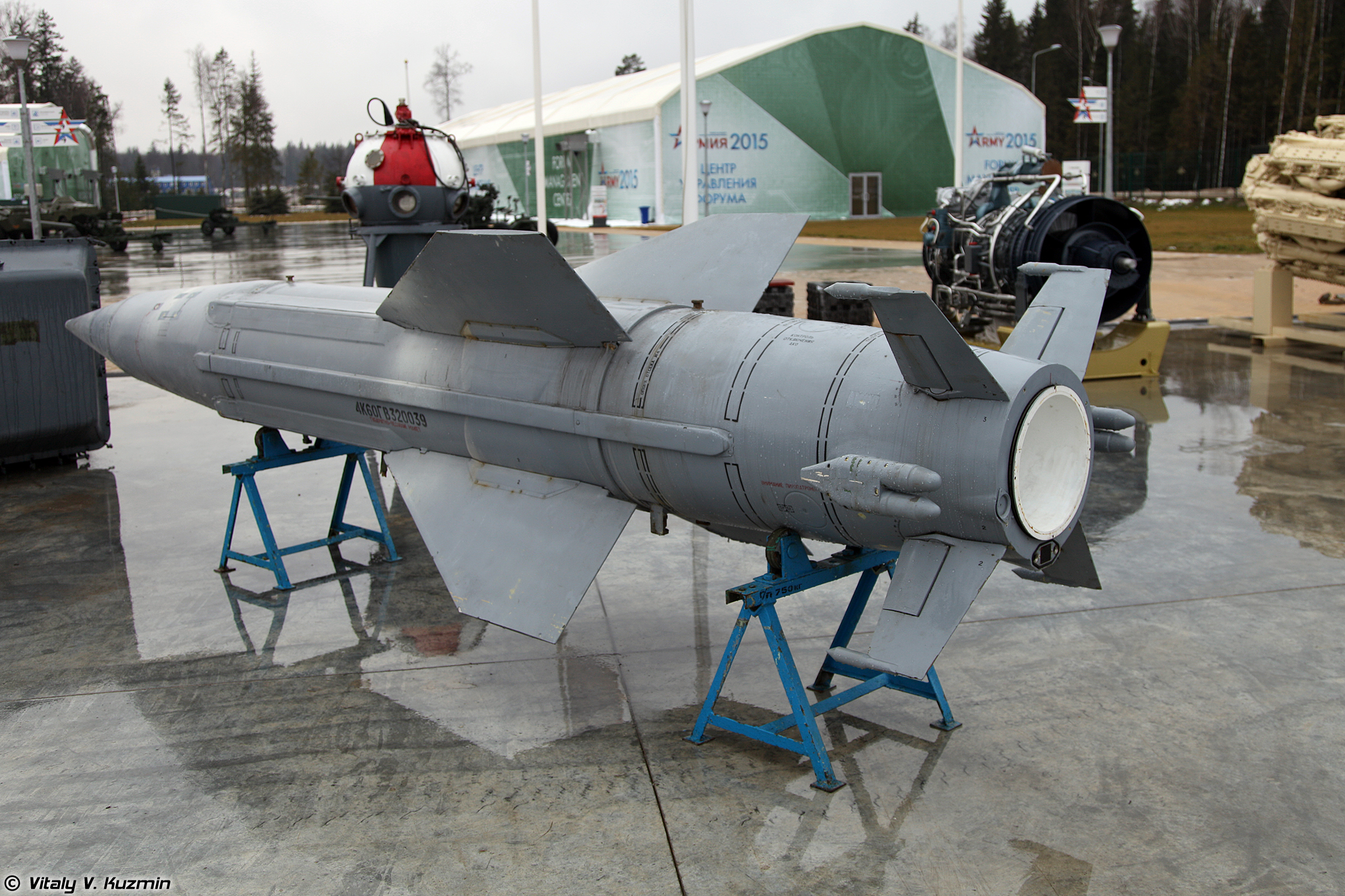 Зенитная управляемая ракета 4К60